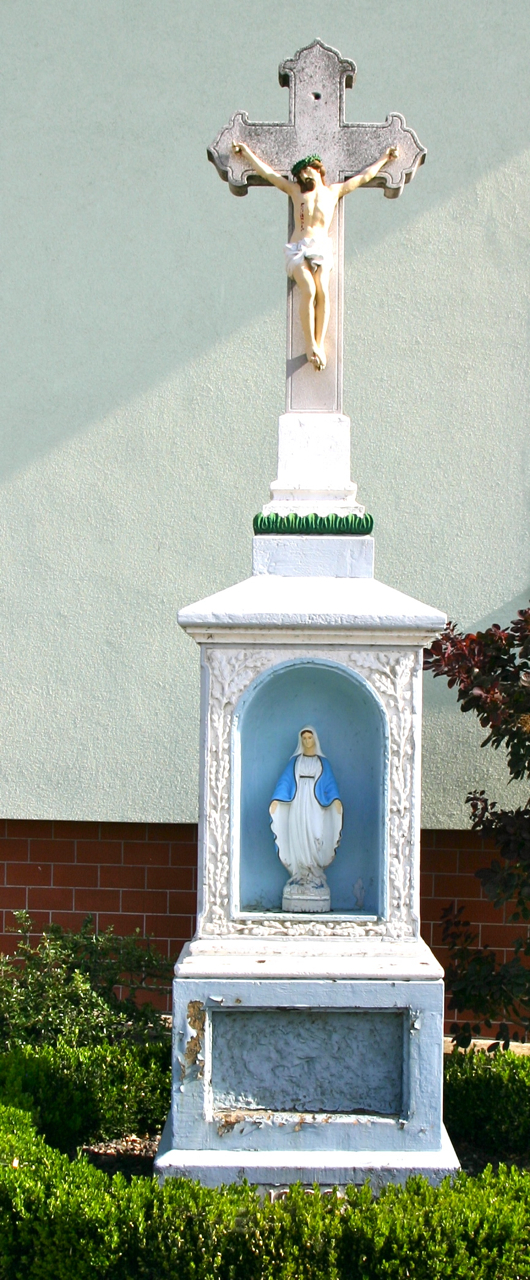 Mionów (dodatkowa nazwa w j. niem. Polnisch Müllmen) – wieś w Polsce położona w województwie opolskim, w w powiecie prudnickim, w gminie Głogówek.